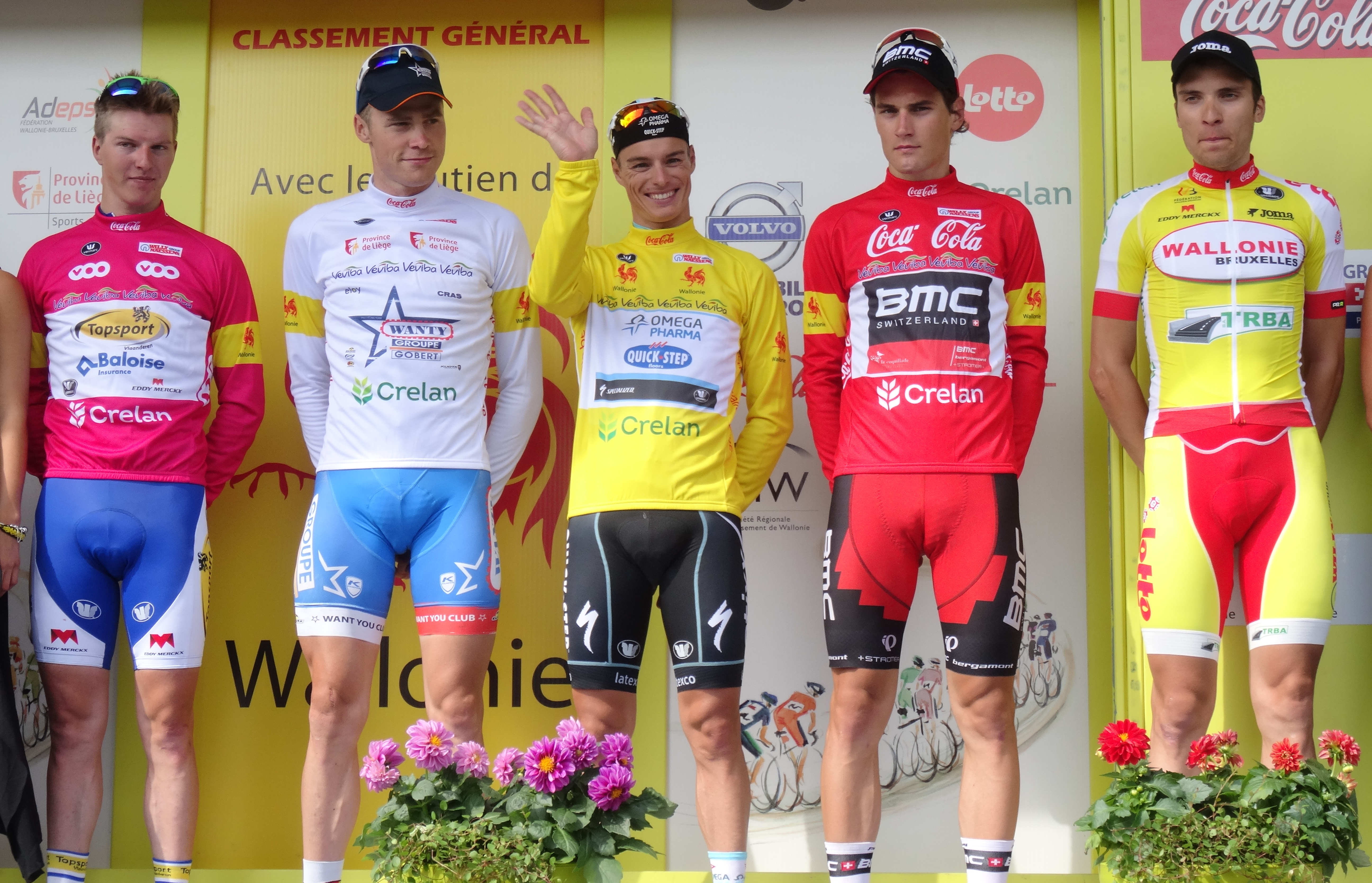 Reportage photographique réalisé le mercredi 30 juillet à l'occasion de l'arrivée de la cinquième et dernière étape du Tour de Wallonie 2014 à Alleur (Ans), Belgique.